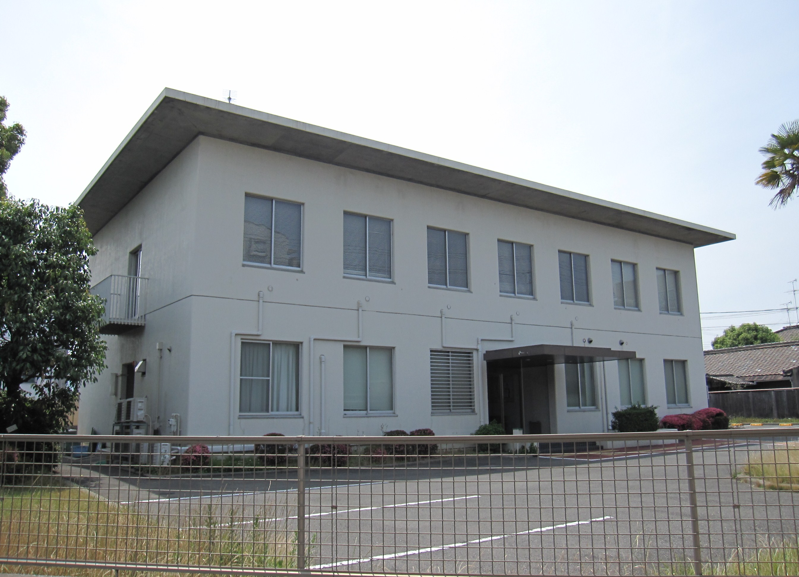 吹田簡易裁判所